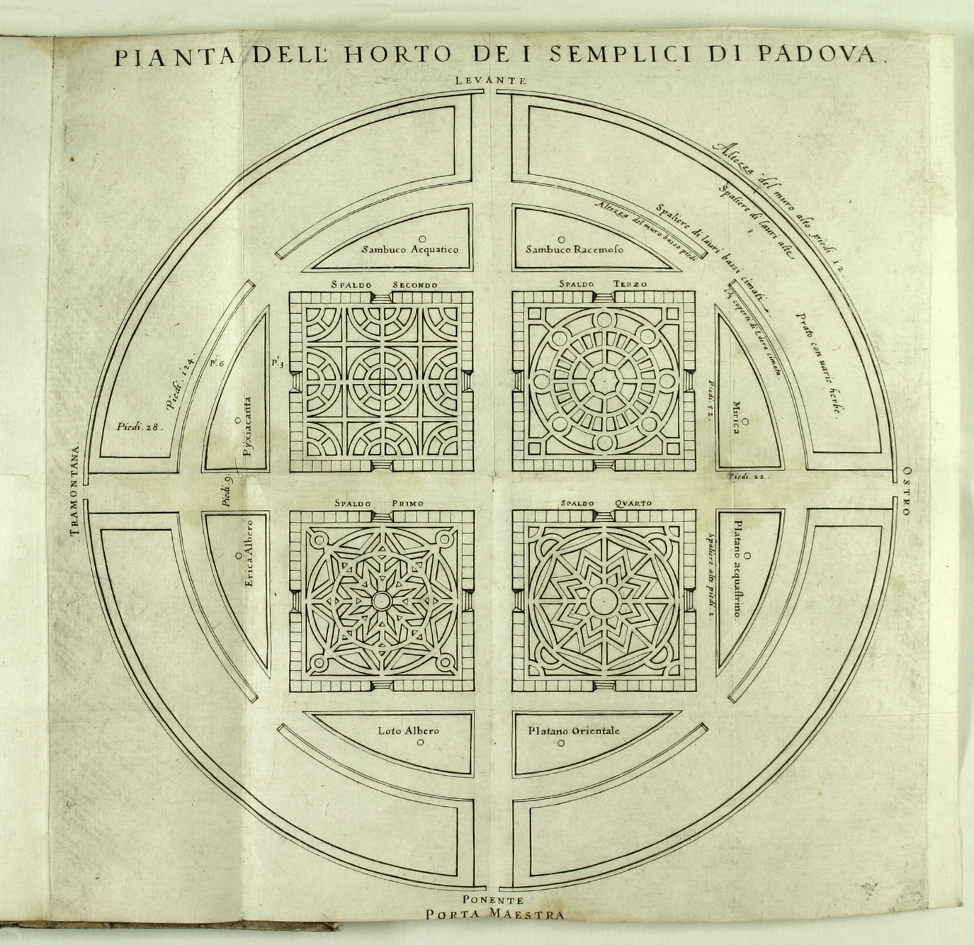 Übersichtsplan des botanischen Gartens zu Padua. Kupferstich, aus: Girolamo Porro, Horto dei semplici di Padova, Venedig 1591. Wolfenbüttel, Herzog August Bibliothek, A: 146.2 Phys.